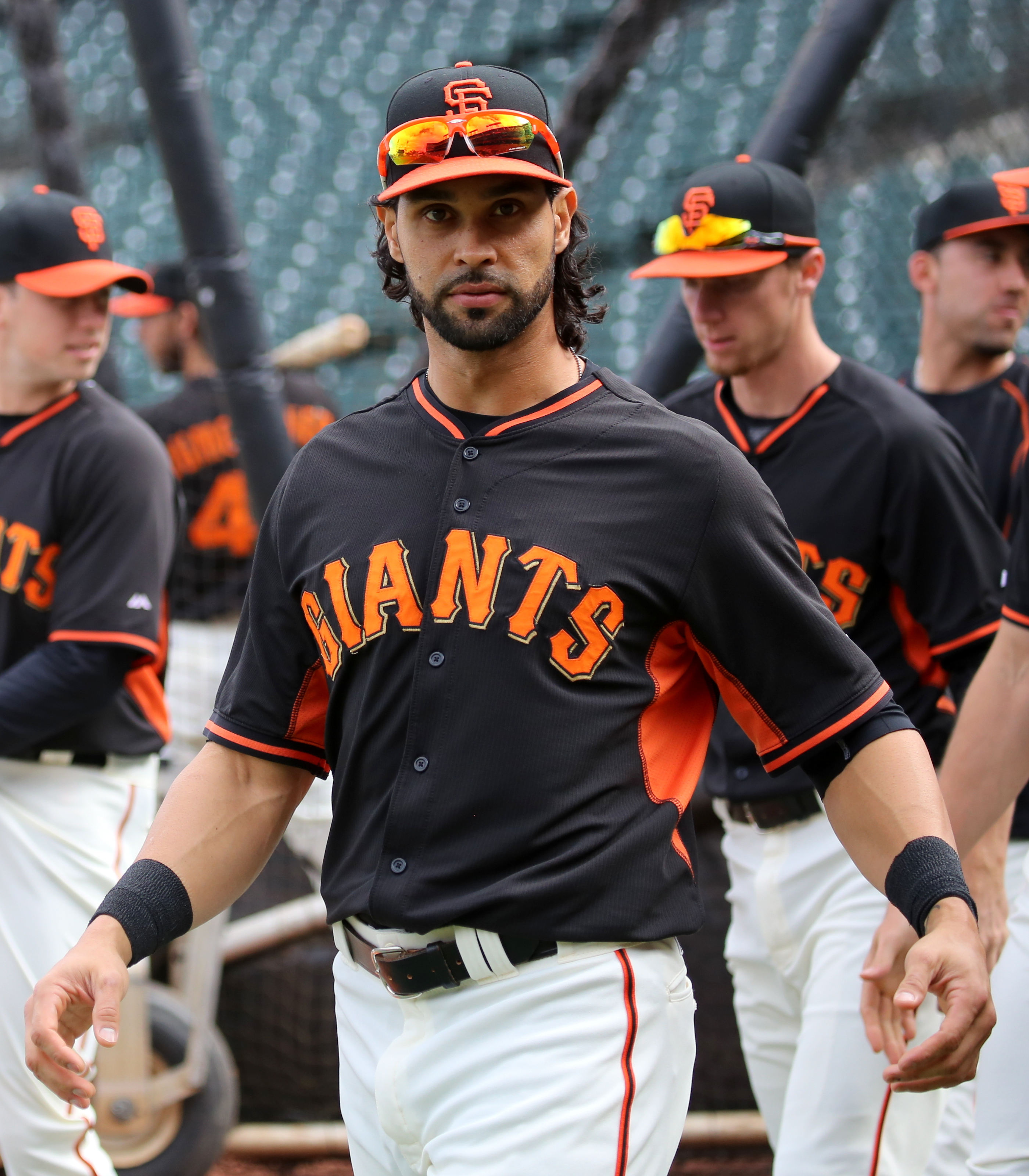 Ángel Pagán